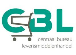 Logo CBL